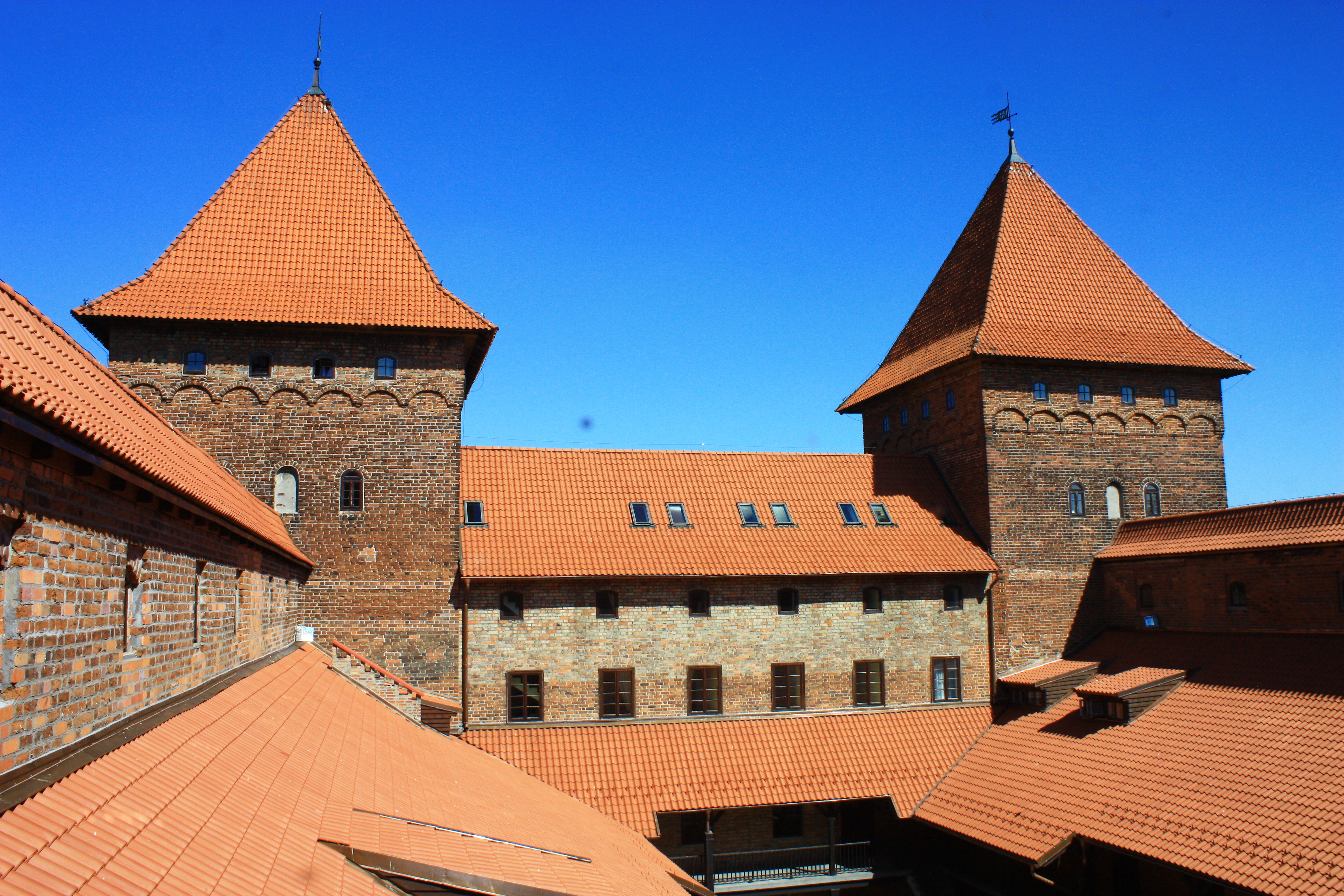 Nidzica, zamek, ob. hotel, pocz. XIV, XIX, po 1945